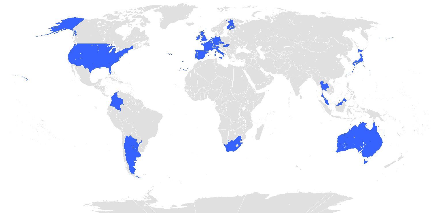 Mapa przedstawiająca państwa z których byli kierowcy MotoGP w sezonie 2015